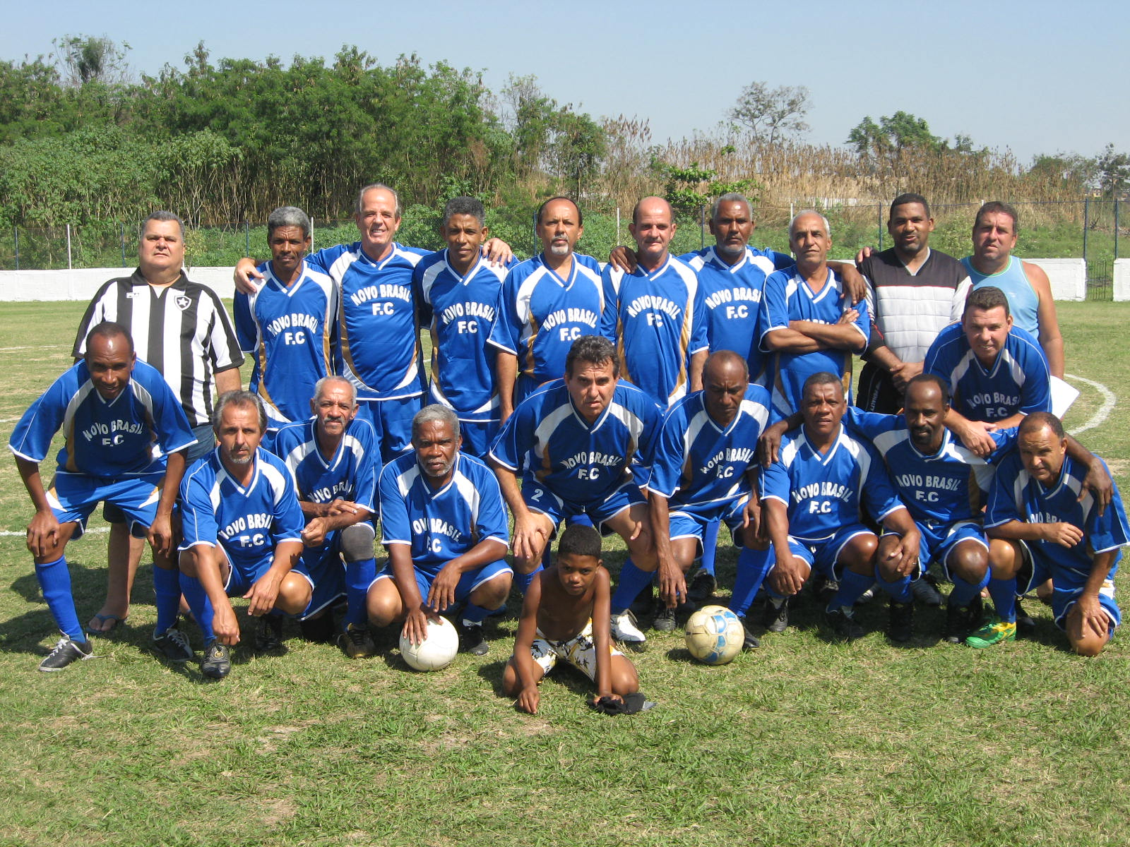 Equipe sub-50 do Novo Brasil Futebol Clube.